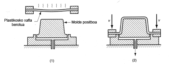 Termokonformaketa